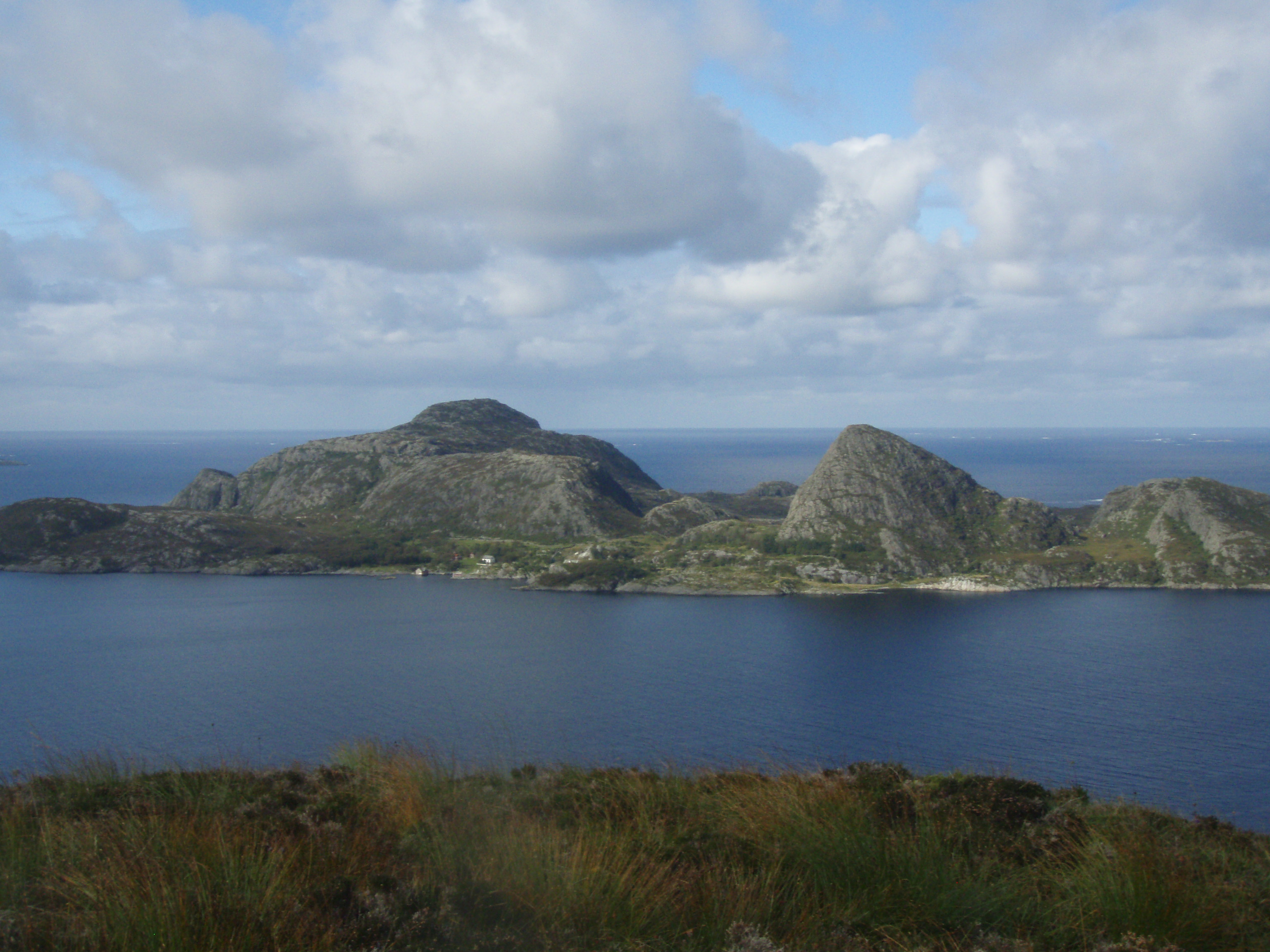 Tvibyrge øy.